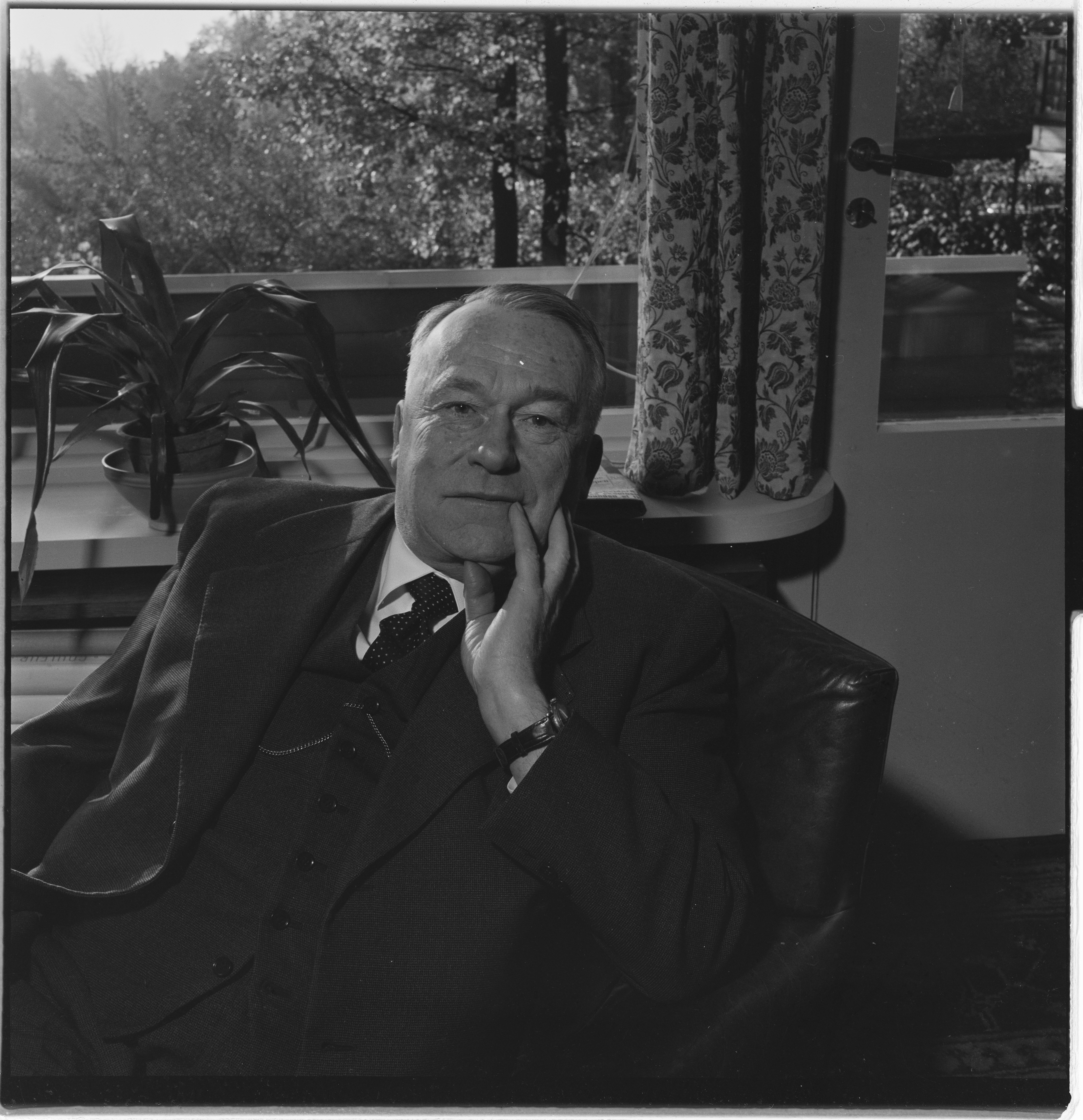 Bildet er hentet fra Arkivverket. Chr. Erlandsen, dir. Arkivinstitusjon : Riksarkivet Arkivnavn : Billedbladet NÅ Sted : Norge, Ukjent, Ukjent, Ukjent Emneord: NHO, Direktør Avbildet: Erlandsen, Christian Wilhelm